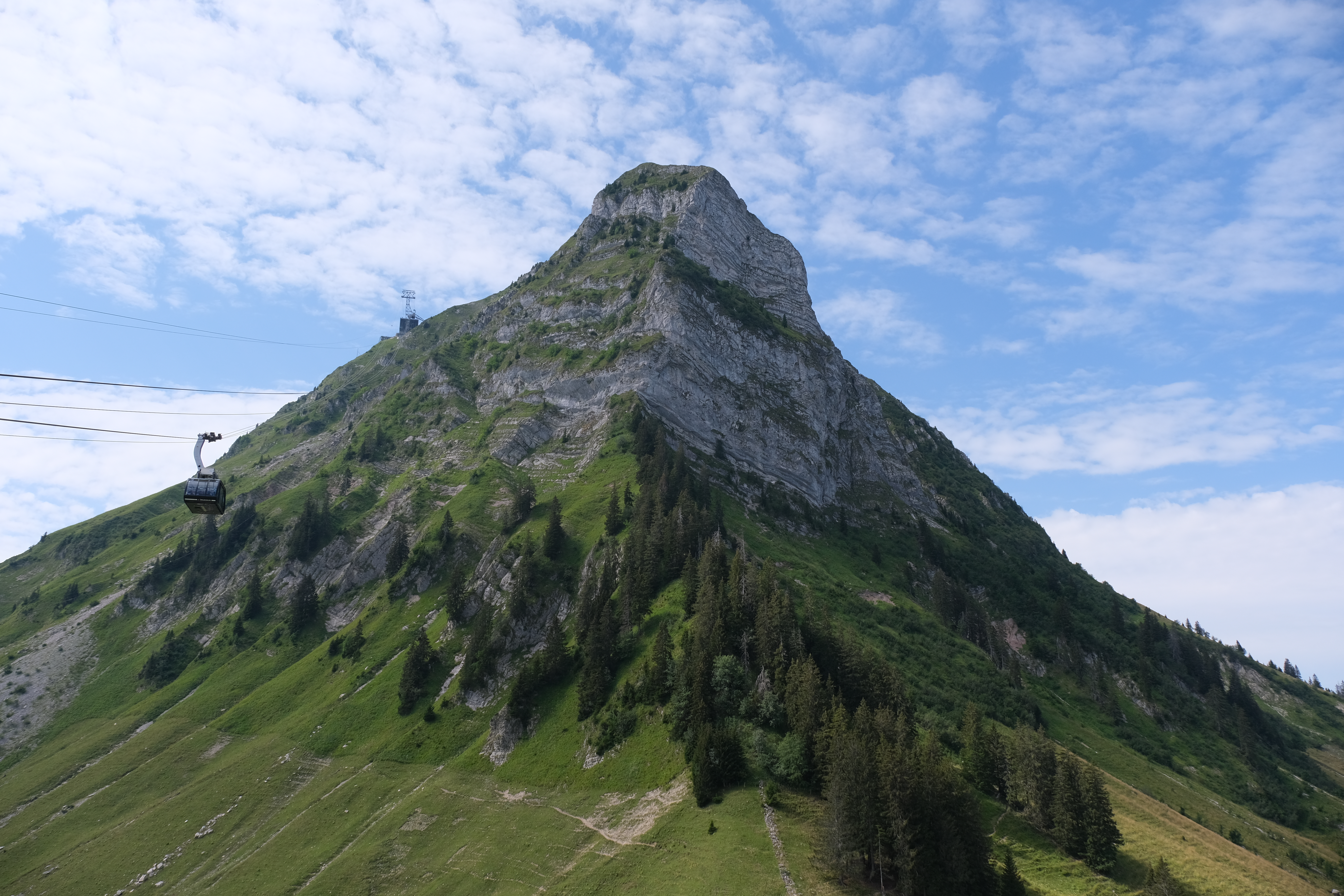 Le Moléson vu depuis le nord est.